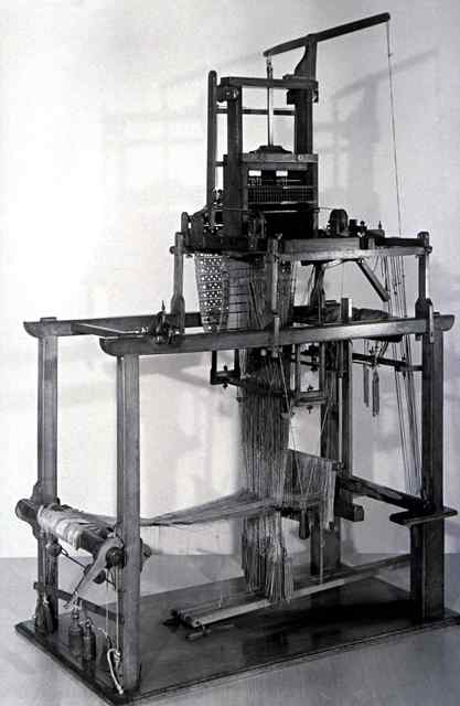 Un métier à tisser de Joseph Marie Jacquard (XIXe) Source : site de l'académie de Rouen